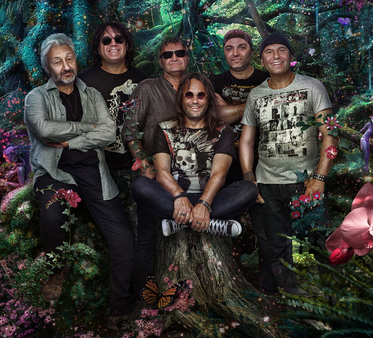 Фото с обложки DVD/CD - Homo sapiens/Flower power